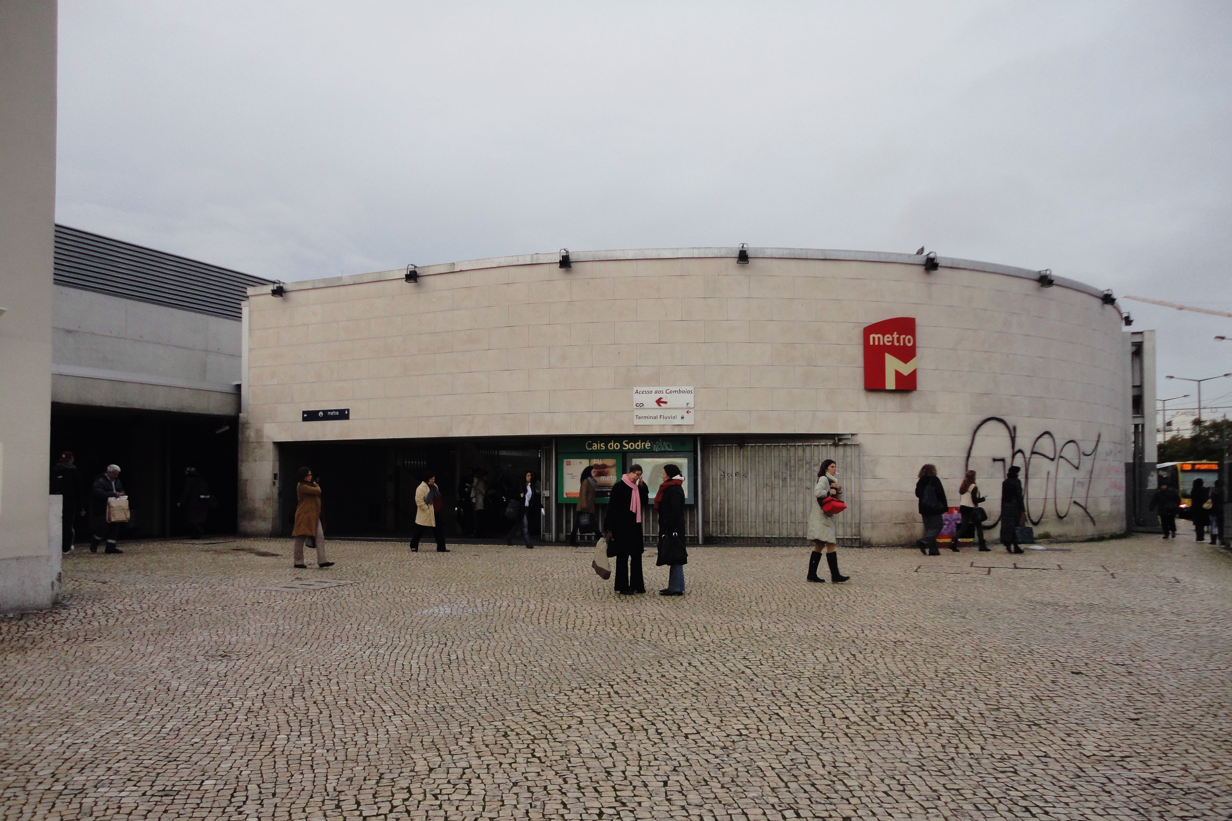 Estação ferroviária do Cais do Sodré; Arq. Pedro Botelho